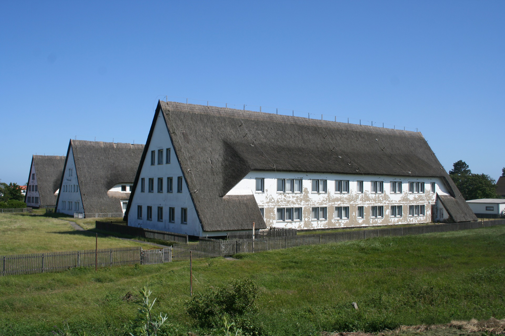 Bilder der Insel Hiddensee